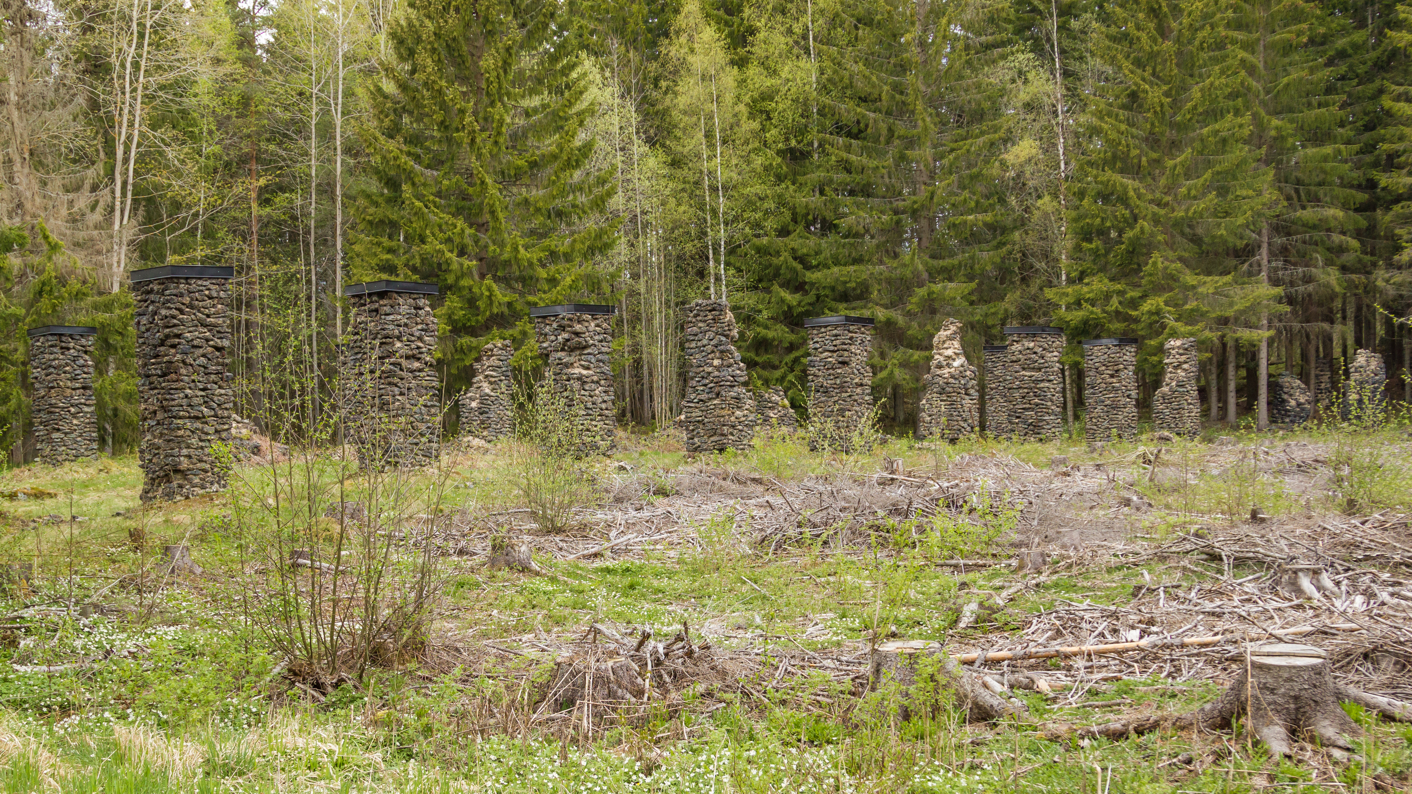 Brattfors, Hedemora kommun, Dalarnas län, Sverige